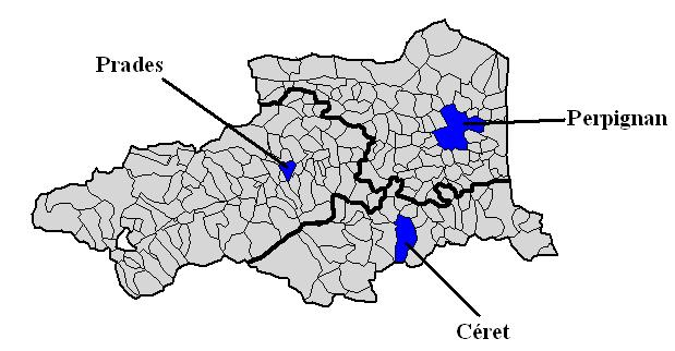 Les 3 arrondissements des Pyrénées-Orientales.